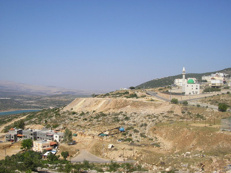 בתיו האחרונים של הכפר עילבון נושקים לתוואי המוביל הארצי. צולם על ידי